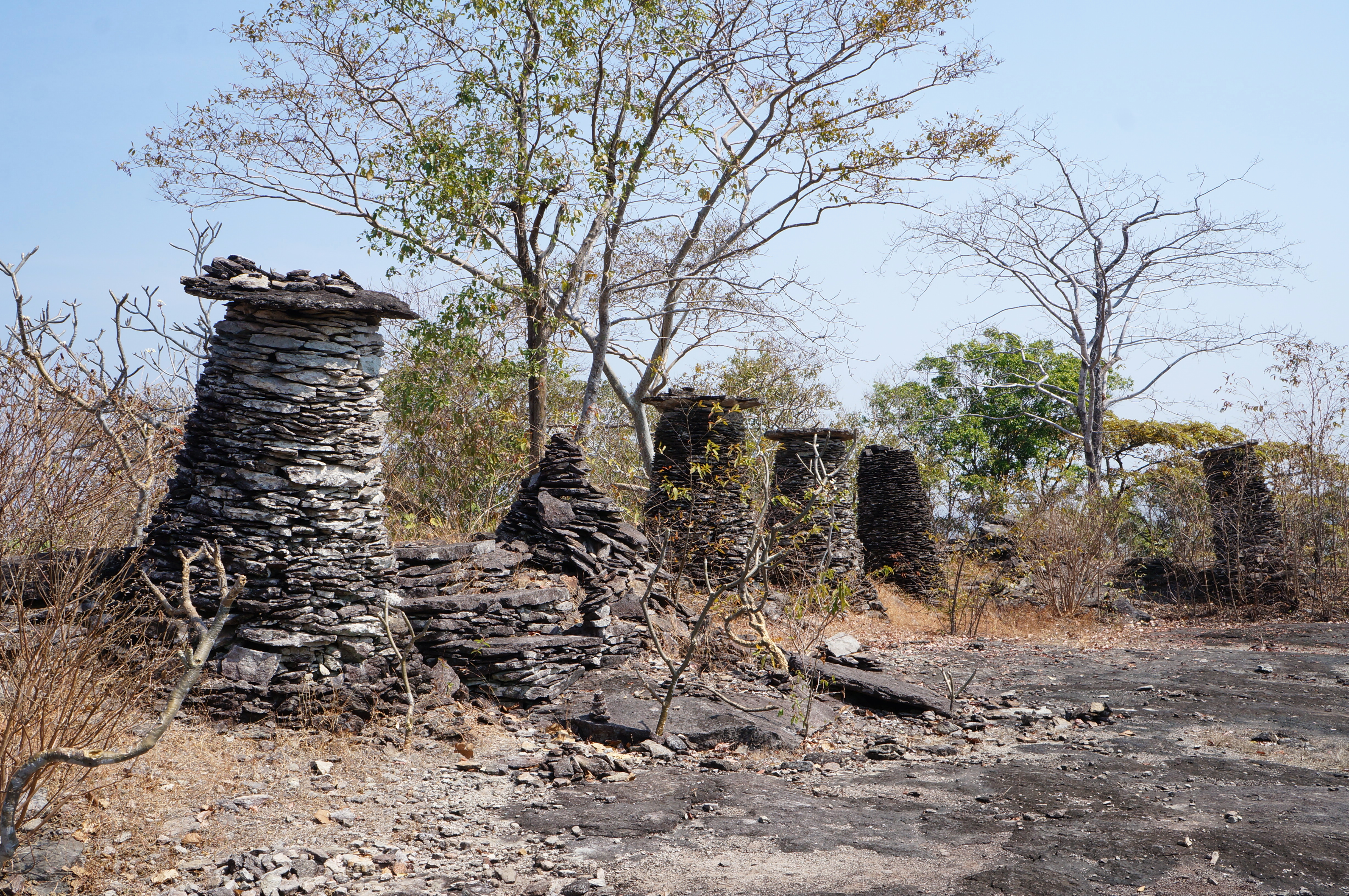 Sanctuaire de Phou Asa Mountain sur Khong Island.- Laos.